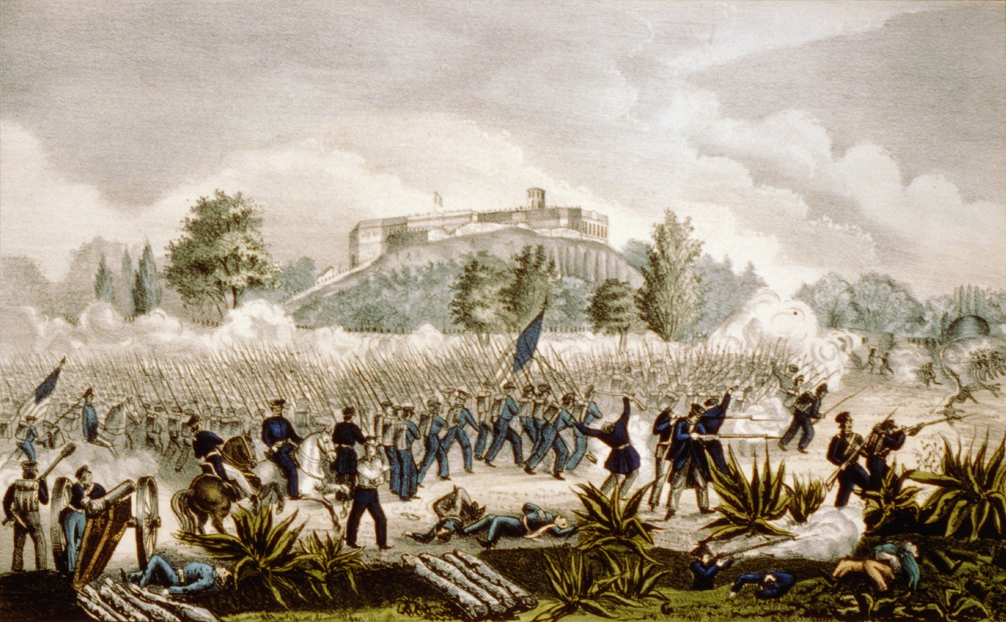 Attack on the Castle Chapultepec / Ataque del Castillo de Chapultepec